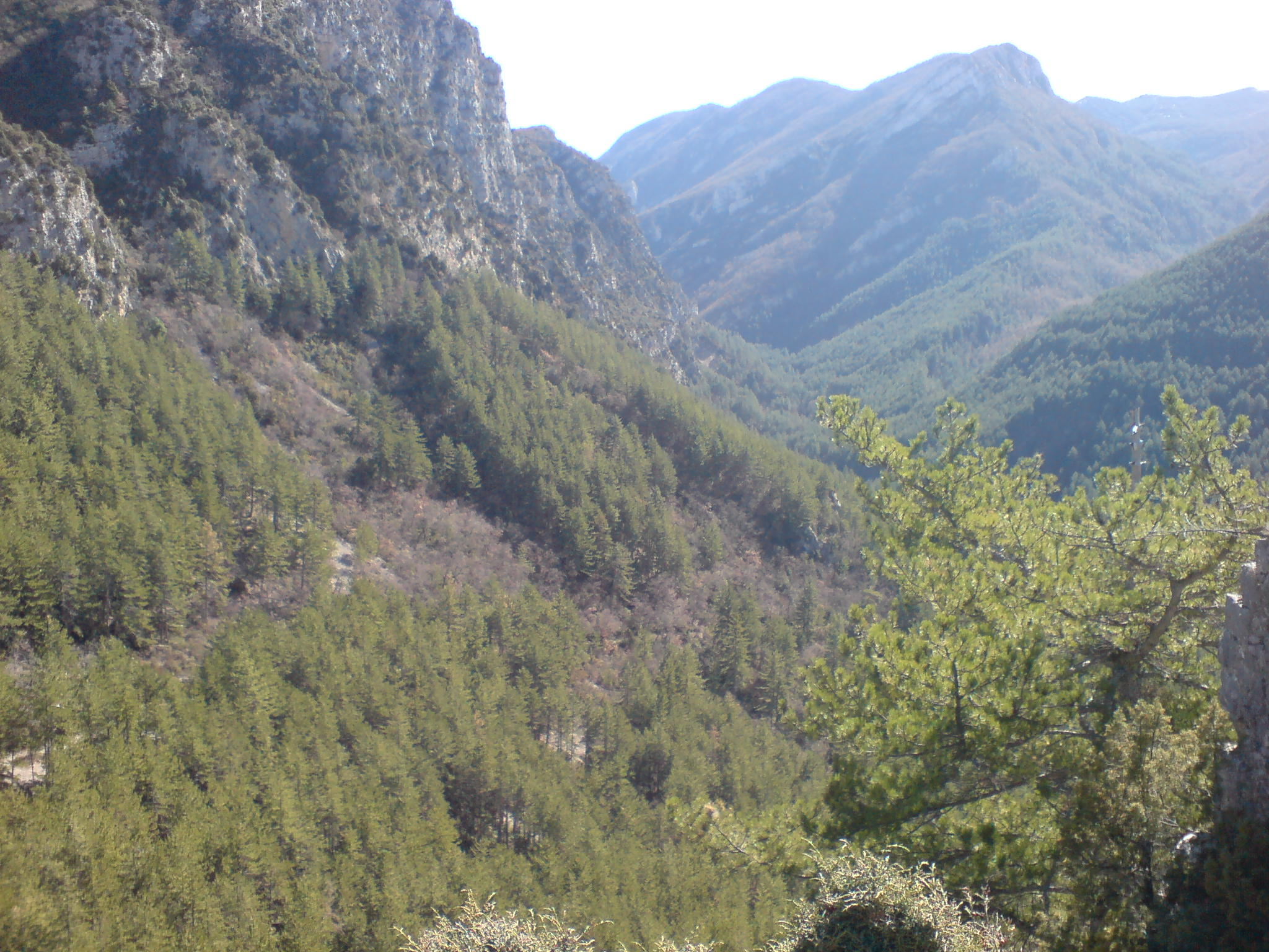 Débouché des gorges de Trévans à Estoublon, pris de la RD 17